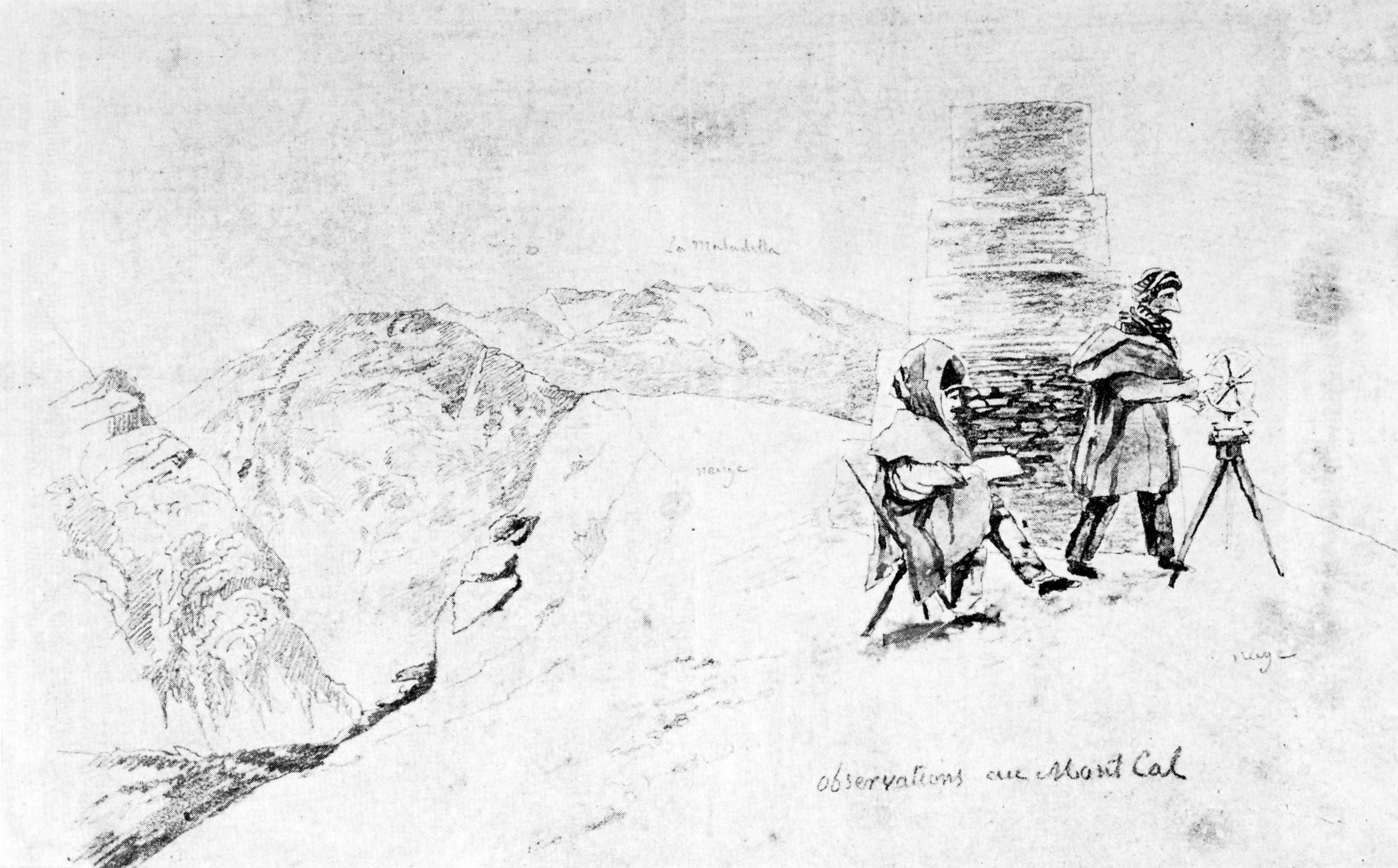 Coraboeuf et Testu observant au Montcaml, dessin de Testu (1827). Archive du Musée pyrénéen.